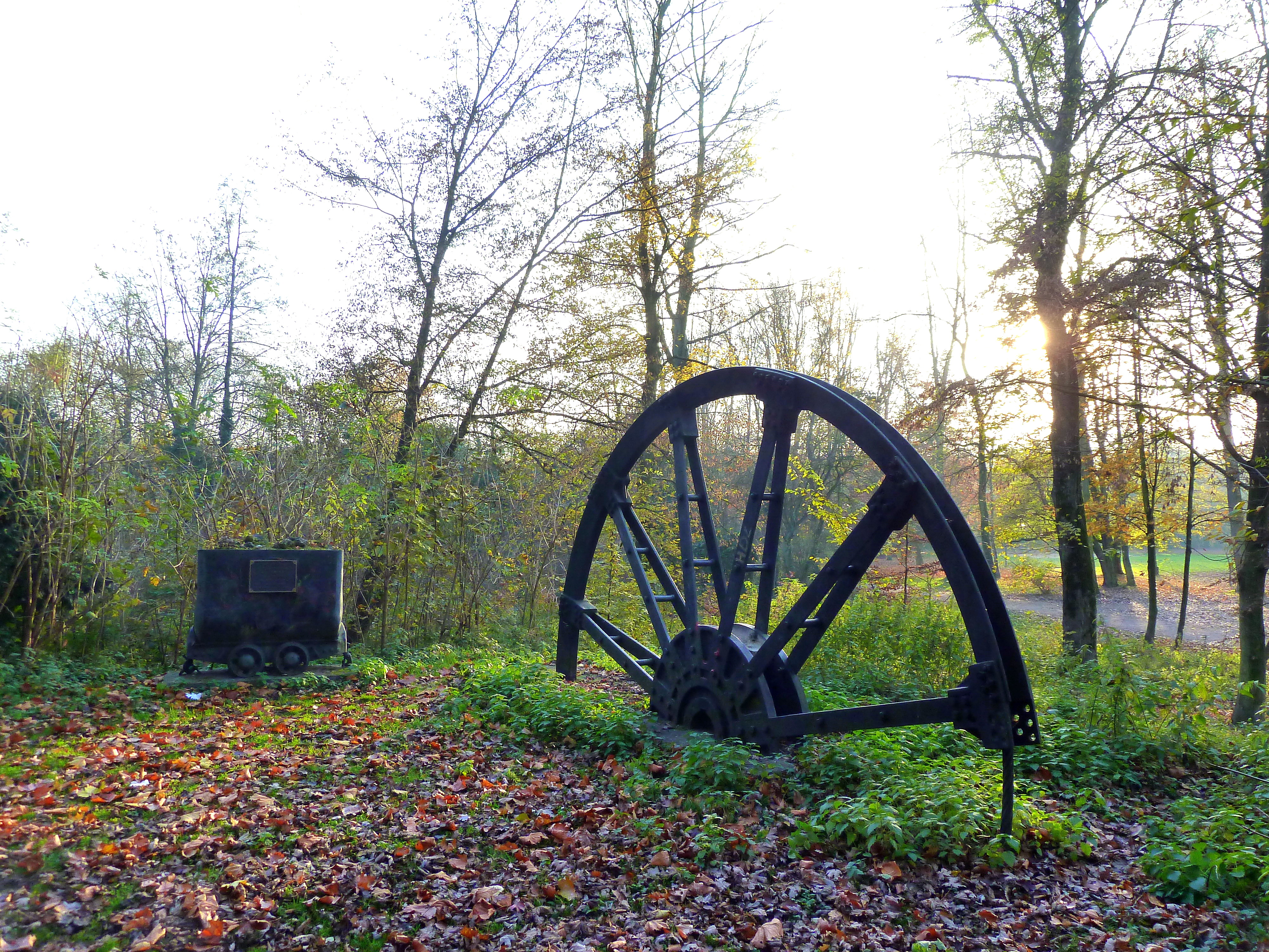 Erinnerung an die letzte Kohleförderung in Alstaden 1972